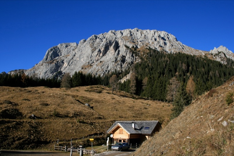 Reisskofel von Süden (2317 m, Gailtaler Alpen), im Vordergrund die Jagdhütte Gregorihütte auf 1492 m